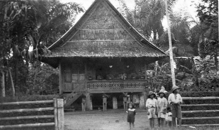 Foto. Een traditionele paalwoning in Langowan